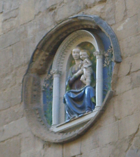 Orsanmichele,_Arte_della_Lana